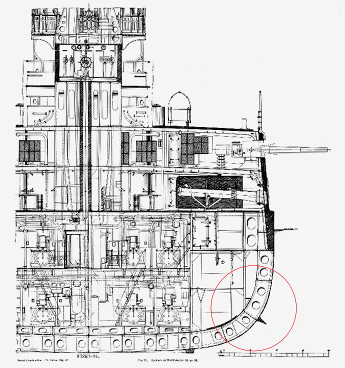 Trancanil